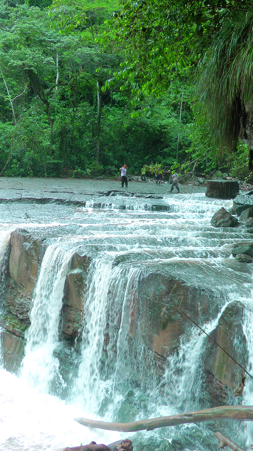 Cascada Nativa Shicshi